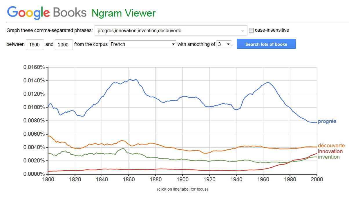 Saisie d'écran d'un exemple d'informations affichées par Ngram Viewer.